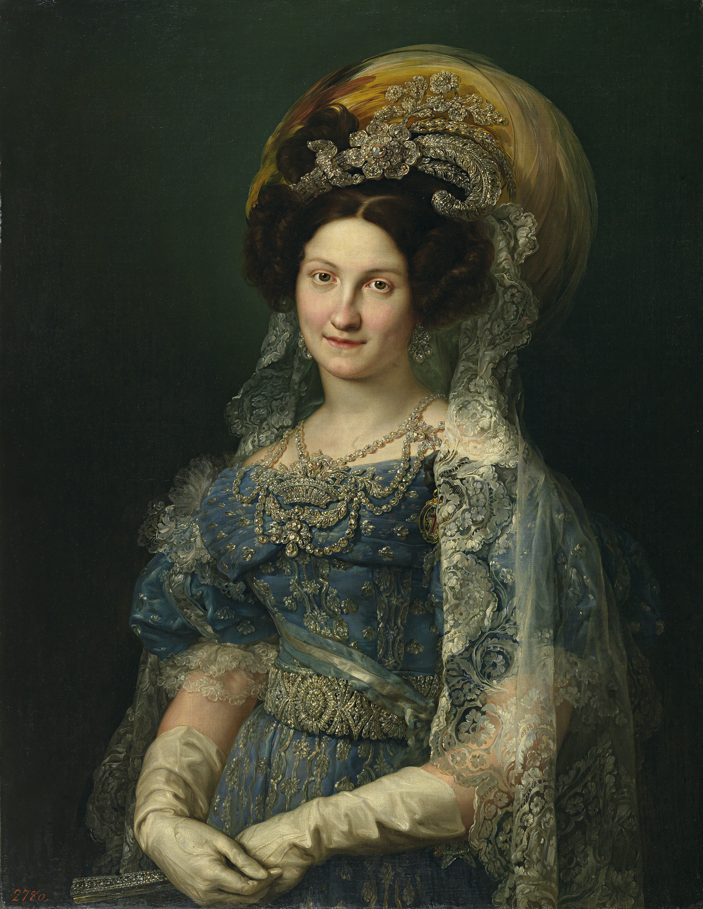 Retrato de la reina María Cristina de Borbón-Dos Sicilias (1806-1878), que fue reina consorte de España por su matrimonio con Fernando VII, de quien fue la cuarta esposa, y madre de la reina Isabel II de España.